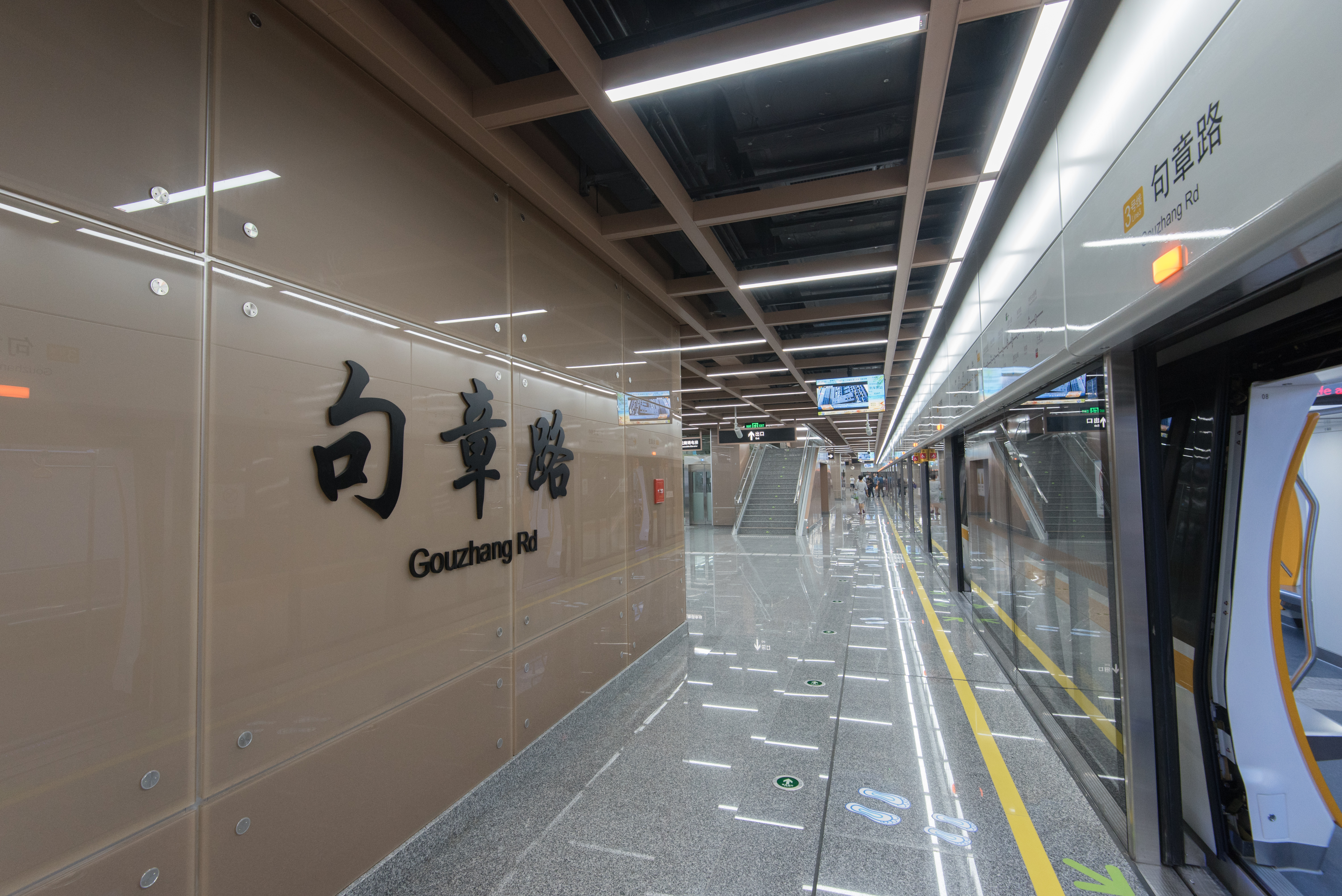 宁波地铁句章路站